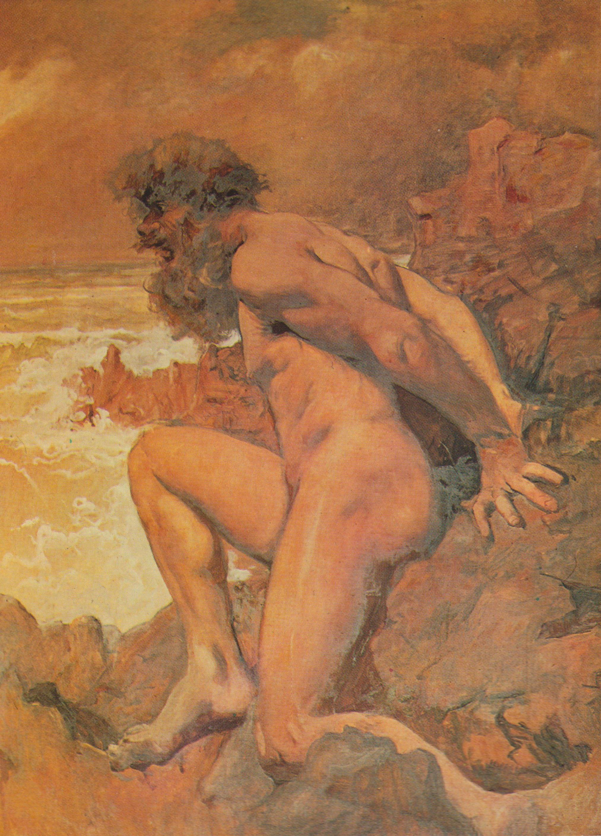 Aparição do Adamastor